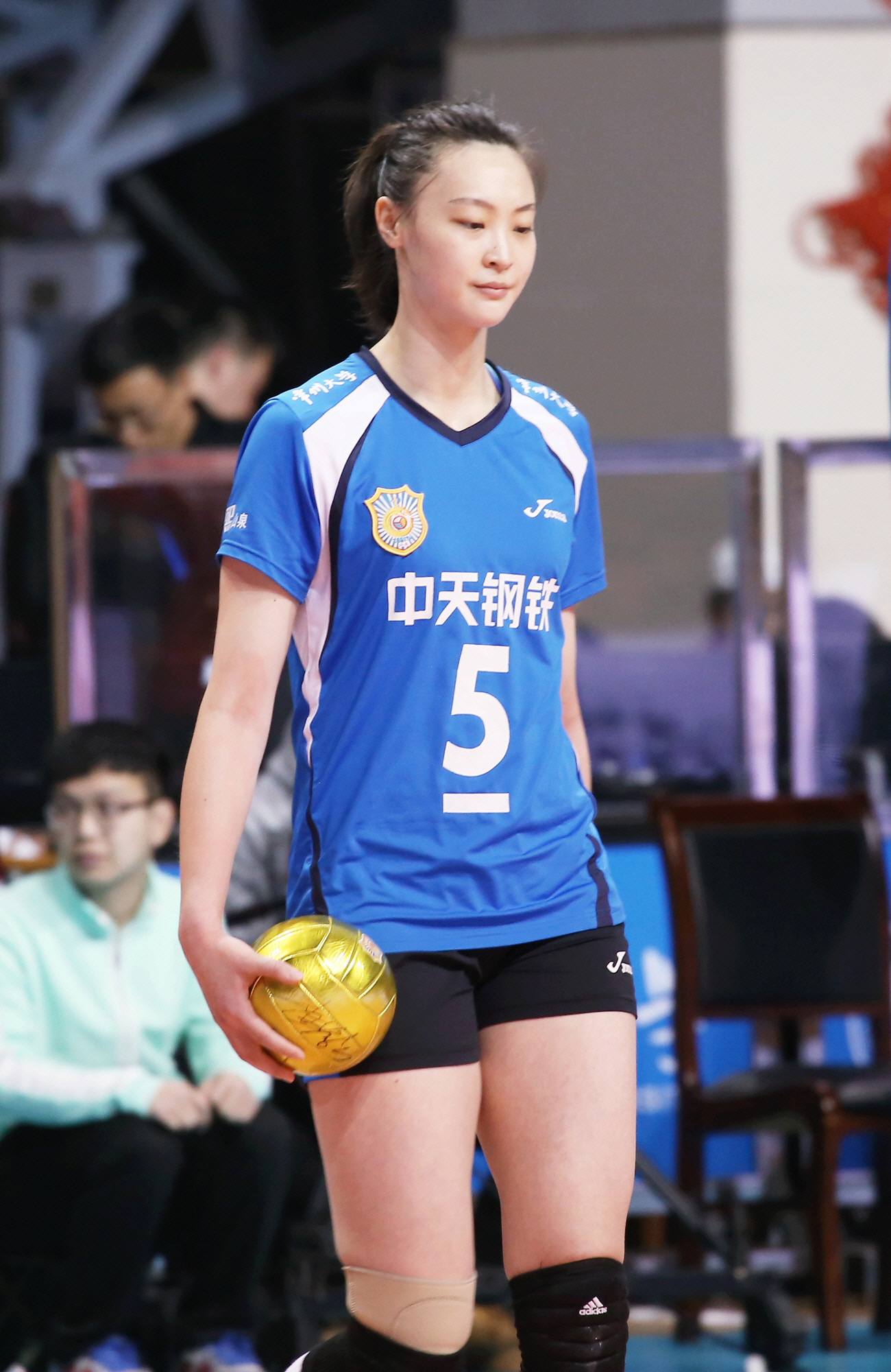 女排联赛 中国女排 惠若琪